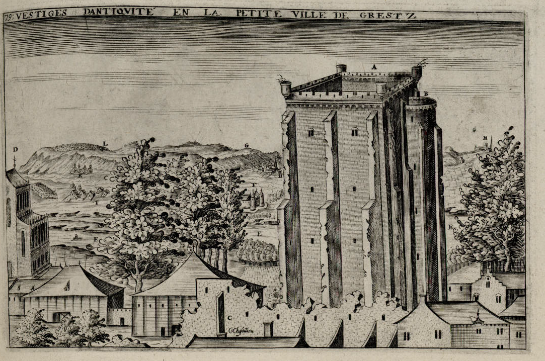 Tour médiévale de la ville de Grestz (aujourd'hui Gretz-Armainvilliers) datant du XIII siècle, la gravure se trouve dans le livre Topographie Française de Claude Chastillon